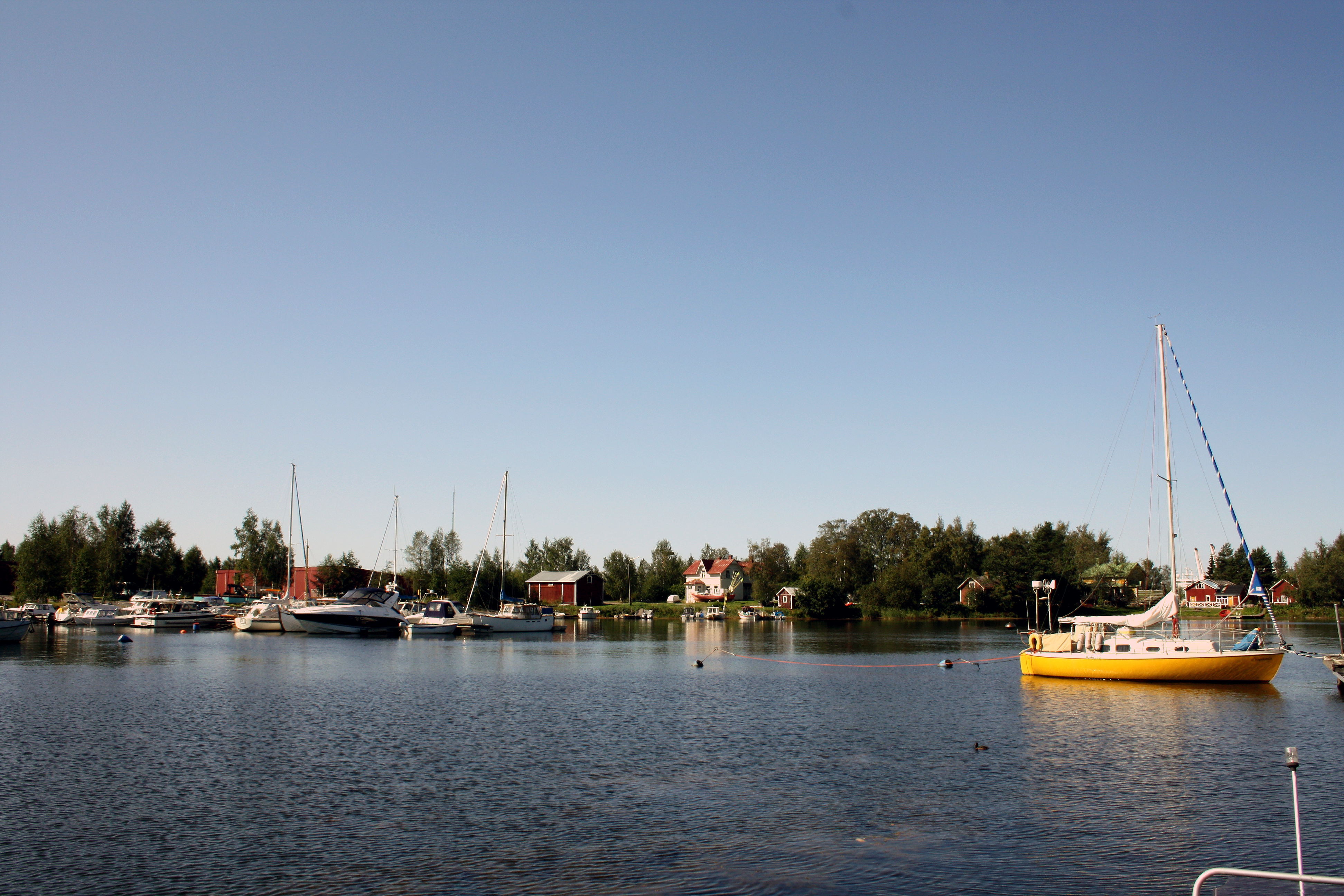 Ykspihlajan pienvenesatamaa Potinrannassa Kokkolassa, Suomessa.